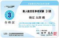 無人航空従事者試験（ドローン検定）３級に合格した者に交付される合格証。一般的なカードと同様のサイズ。